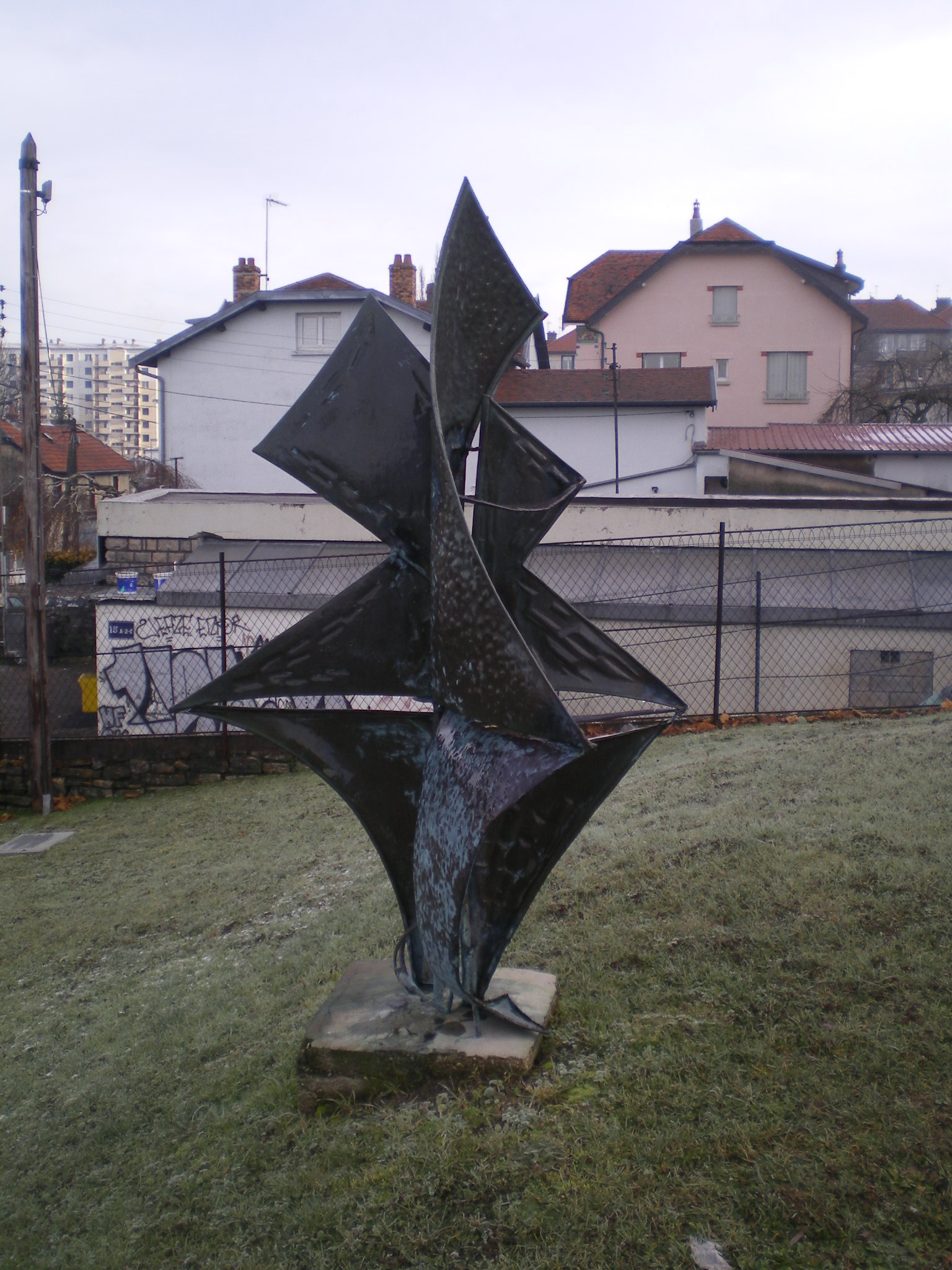 Sculpture